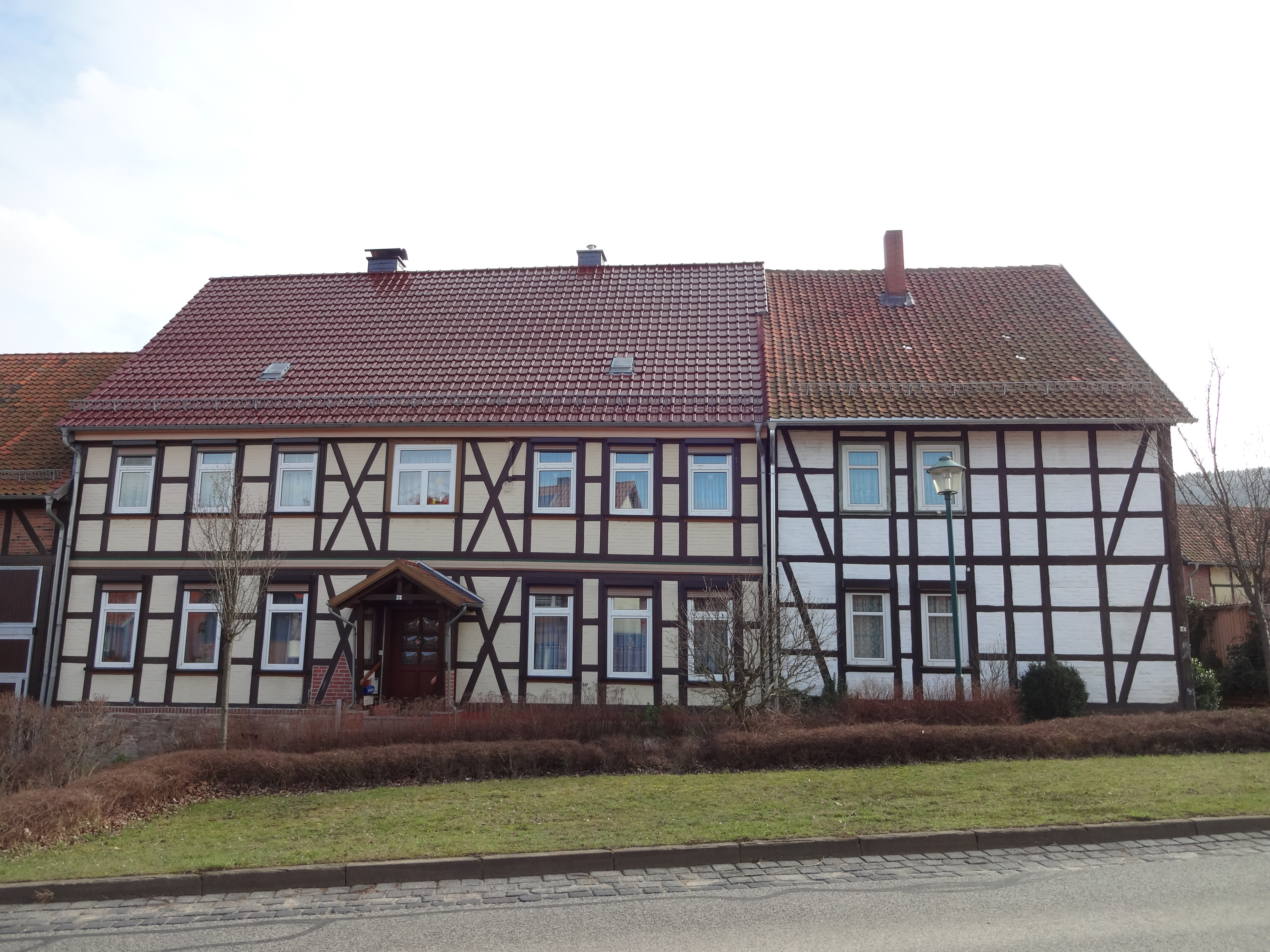 ehemaliges Kulturdenkmal Bauernhaus in der Blankenburger Straße 5 in Benzingerode, Ortsteil von Wernigerode